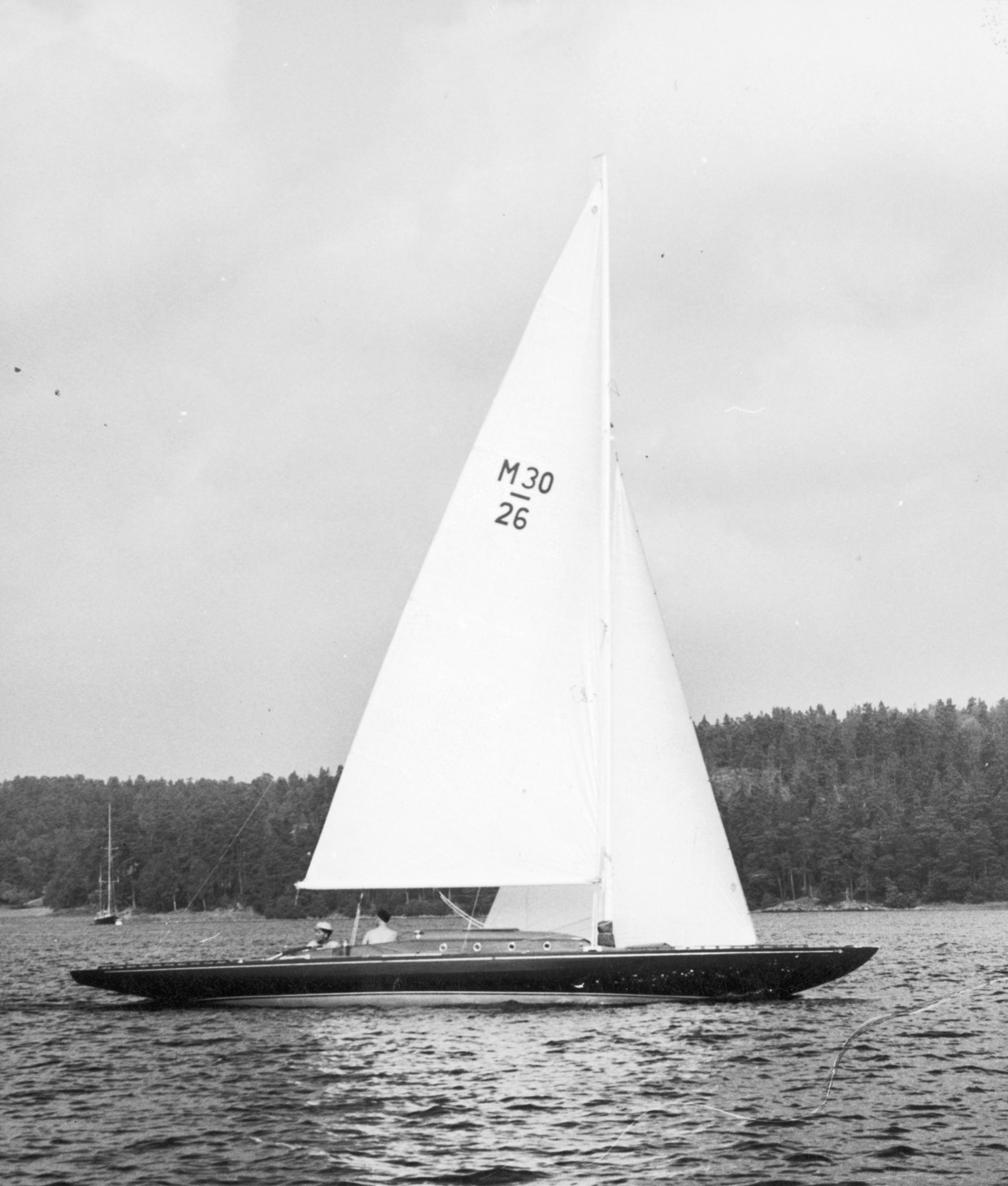 Motivbeskrivning: "M30:an Dorrit V var framgångsrik i både pokalseglingarna och i öppna regattan" Motiv-ämnesord: M30, M30-26 Dorrit V, Mälar 30